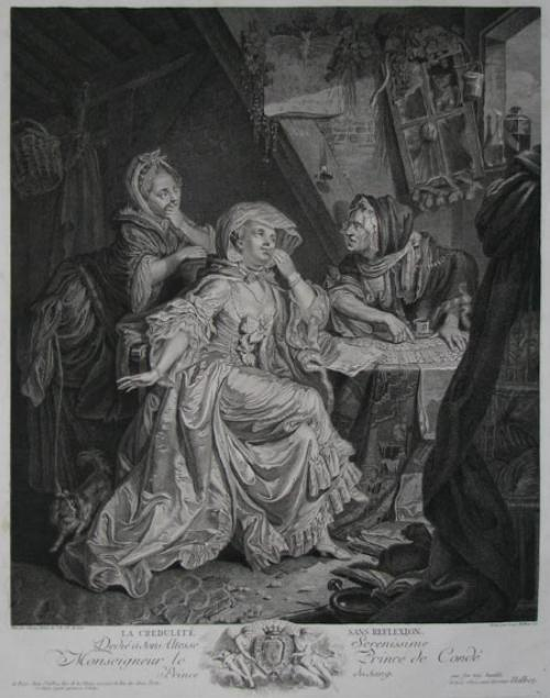 La Credulite Sans Reflexion.Dedie a Son Altesse Serenissime Monseigneur le Prince de Conde Prince du Sang. par son tres humble et tres obeissant Serviteur Halbou